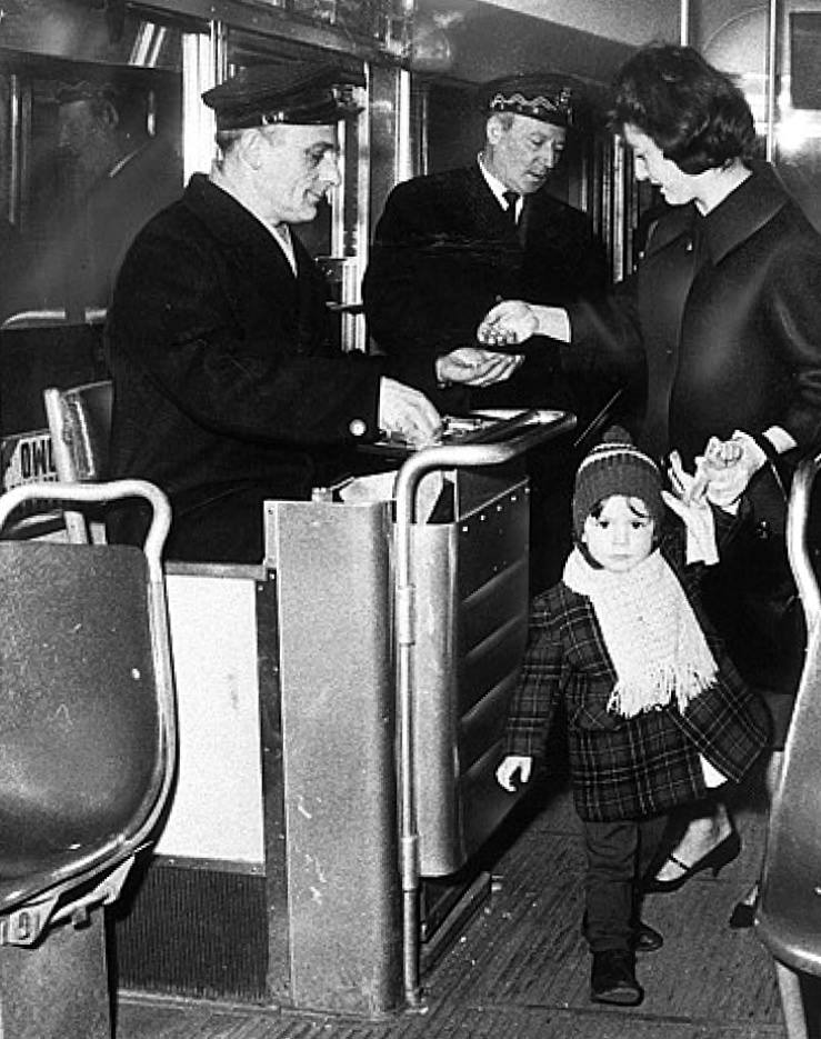 bigliettaio e controllare su tram ATM